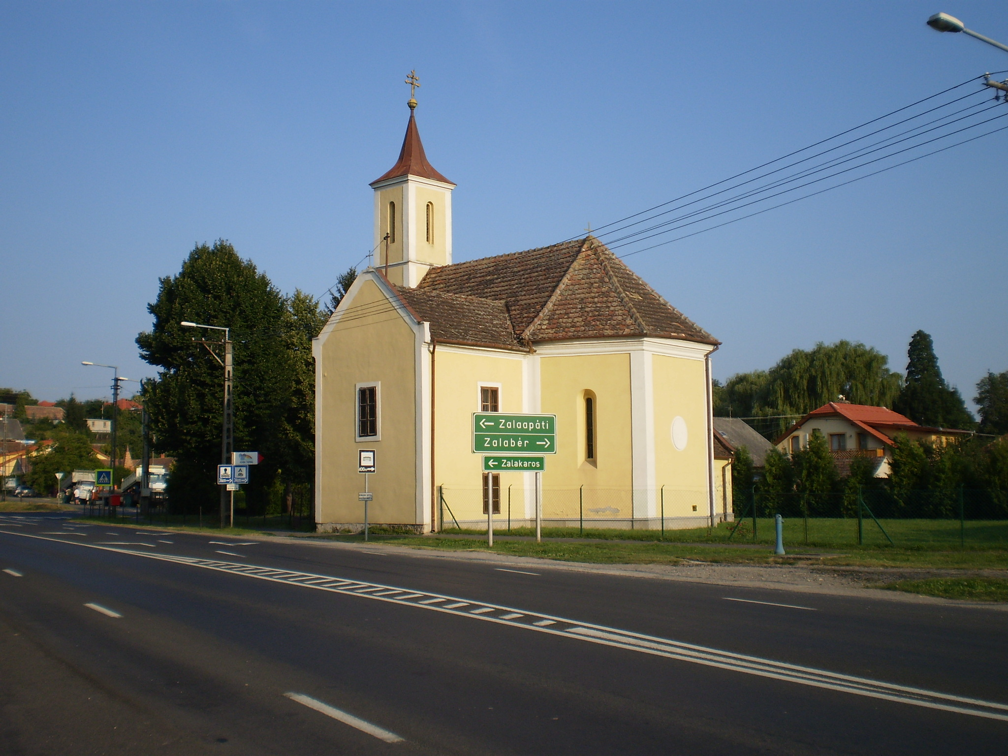 Zalacsányi templom